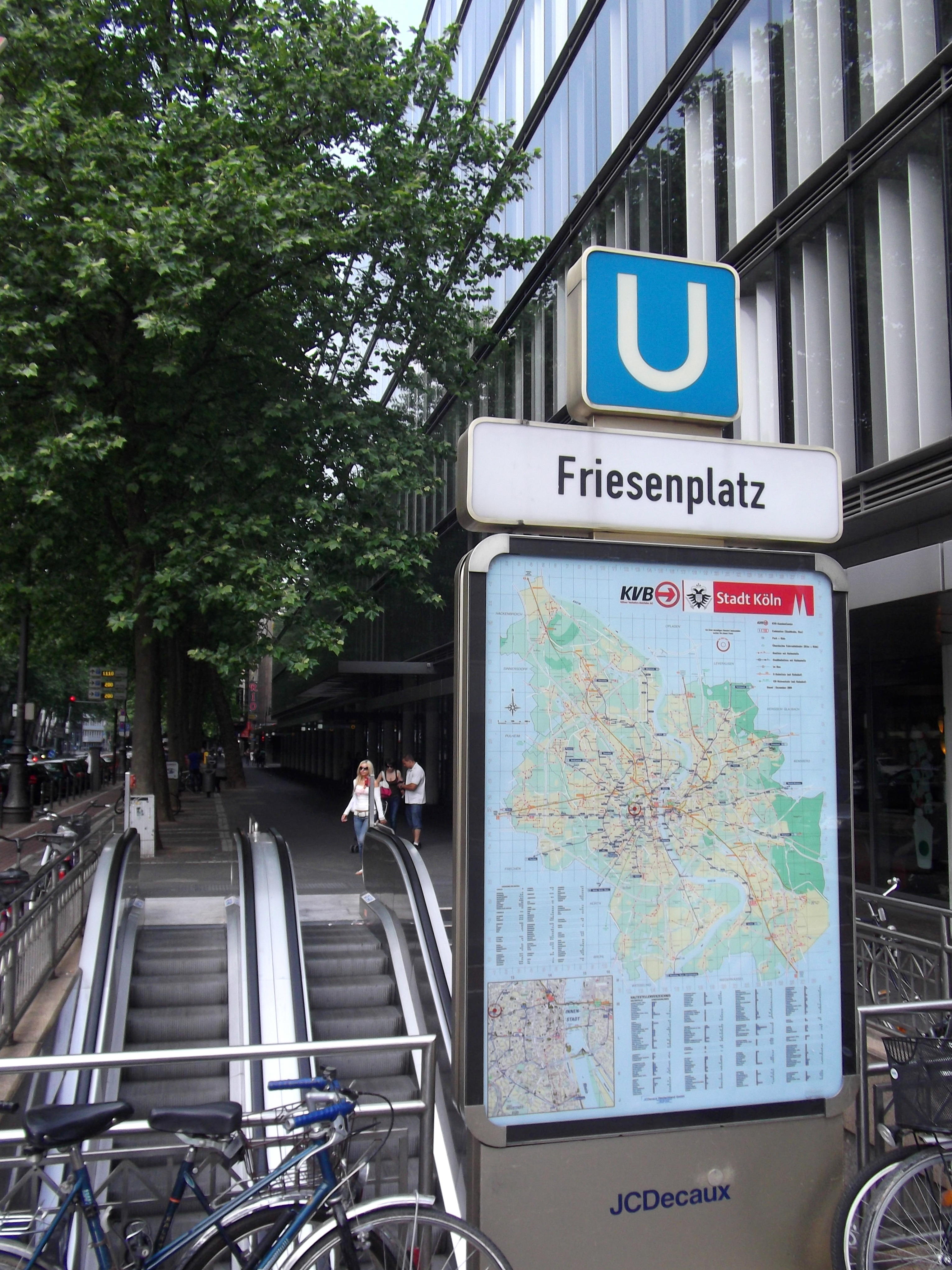 Cologne (Köln), Germany: Innenstadt: Hohenzollernring: Eingang KVB-U-Bahnhof Friesenplatz